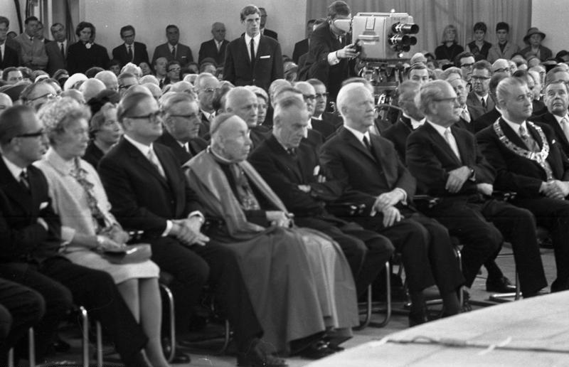 Verleihung des Friedenspreises des deutschen Buchhandels an Kardinal Bea u. [Willem A.] Visser't Hooft in der Paulskirche